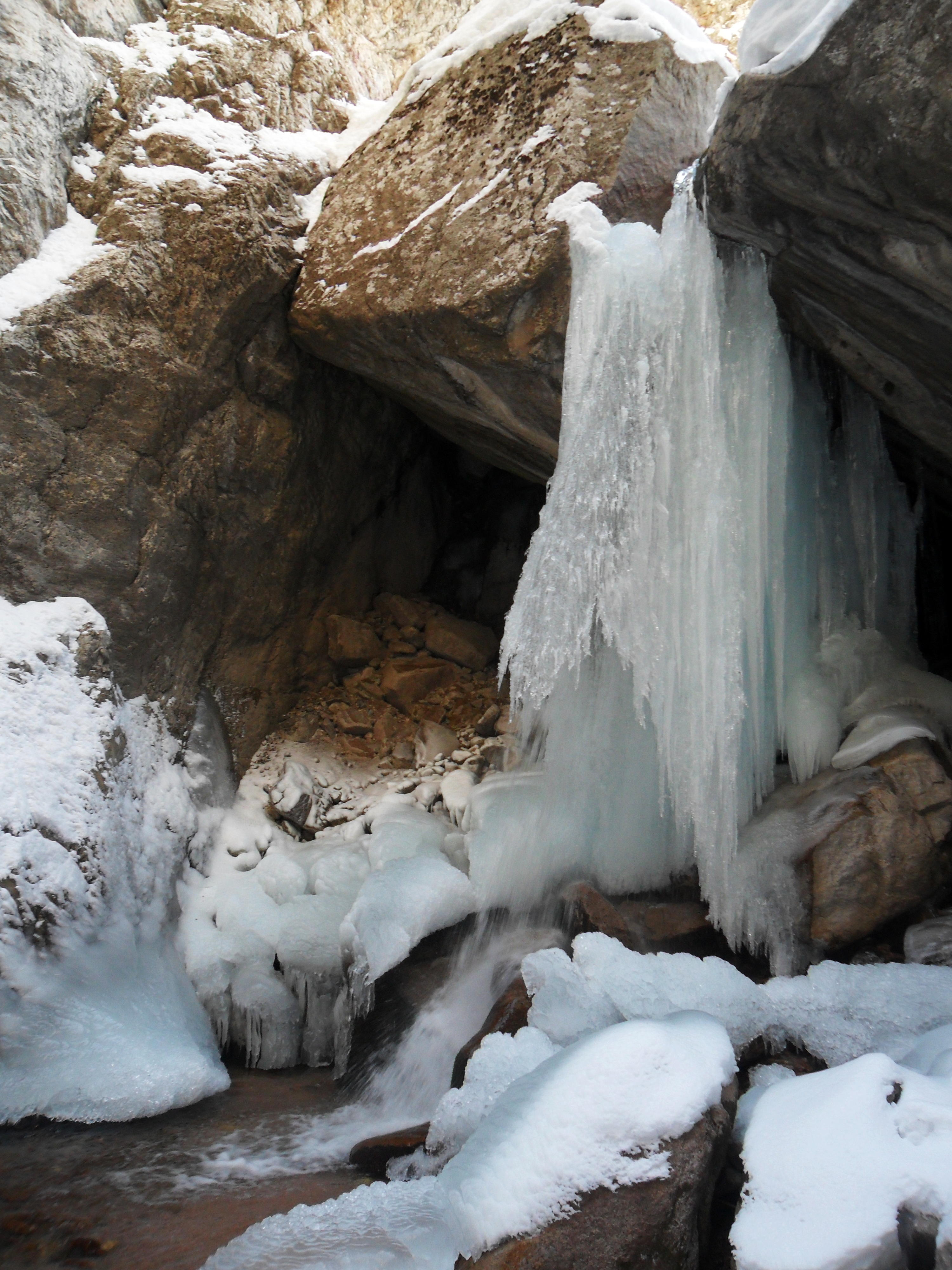 Водопад на Гулькамсае зимой. Бостанлыкский район, Ташкентская область, Республика Узбекистан